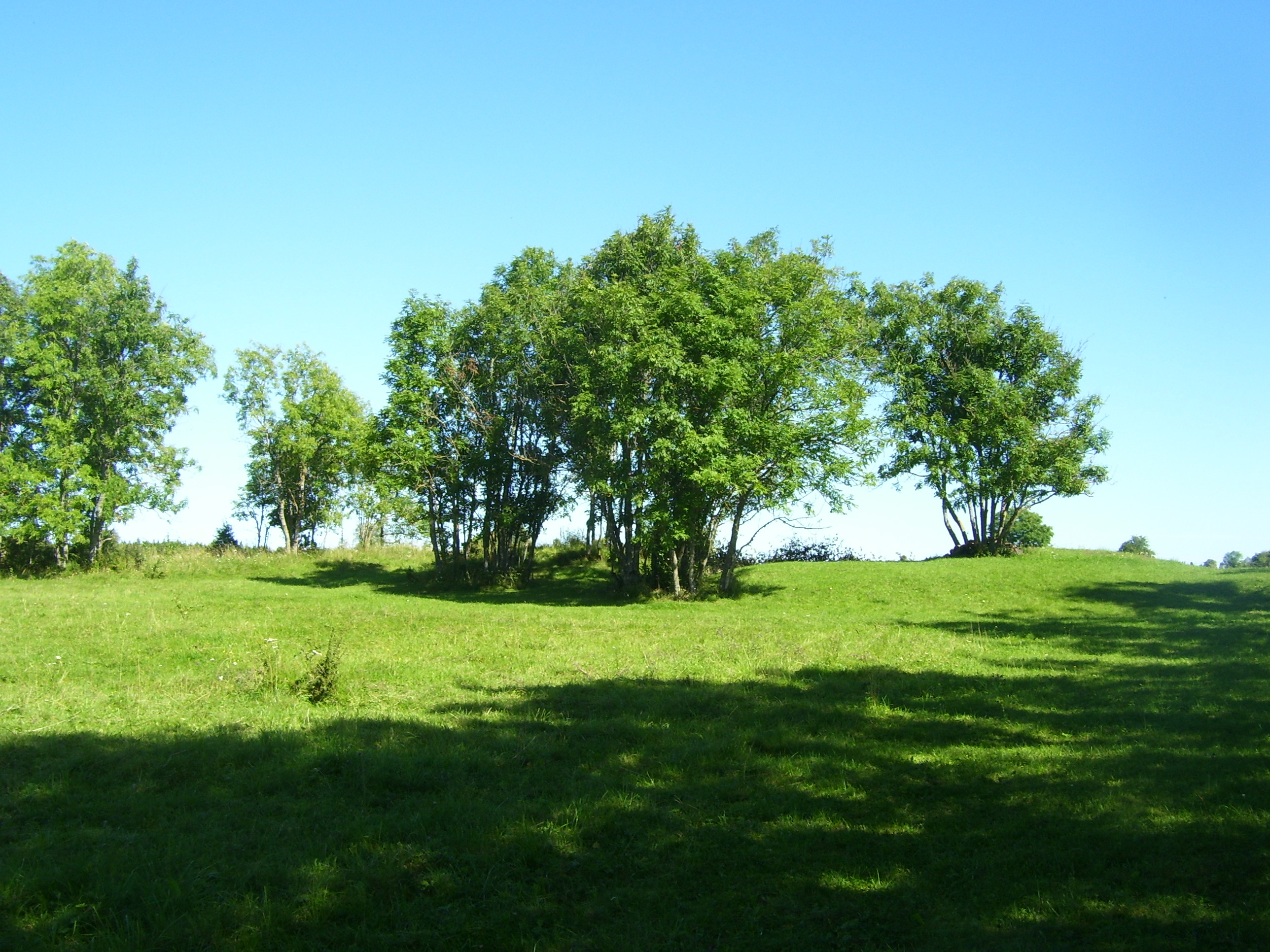 Kabelikangrud, Muuksi küla, Kuusalu vald.